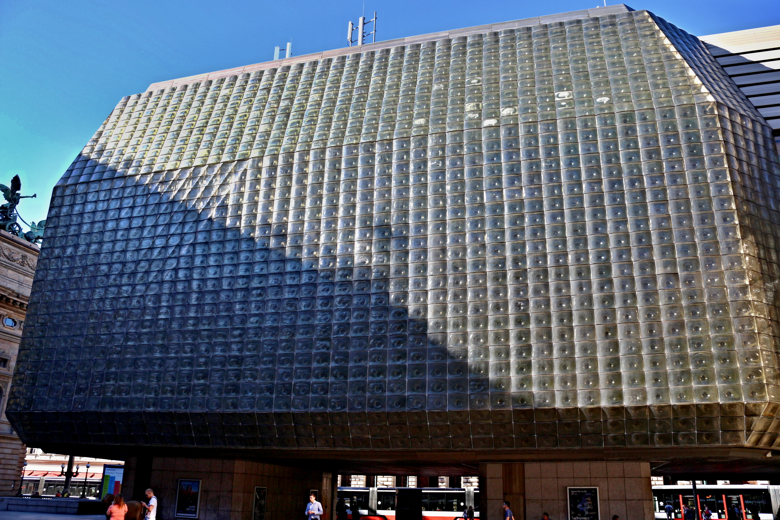 Nová scéna ND v Praze